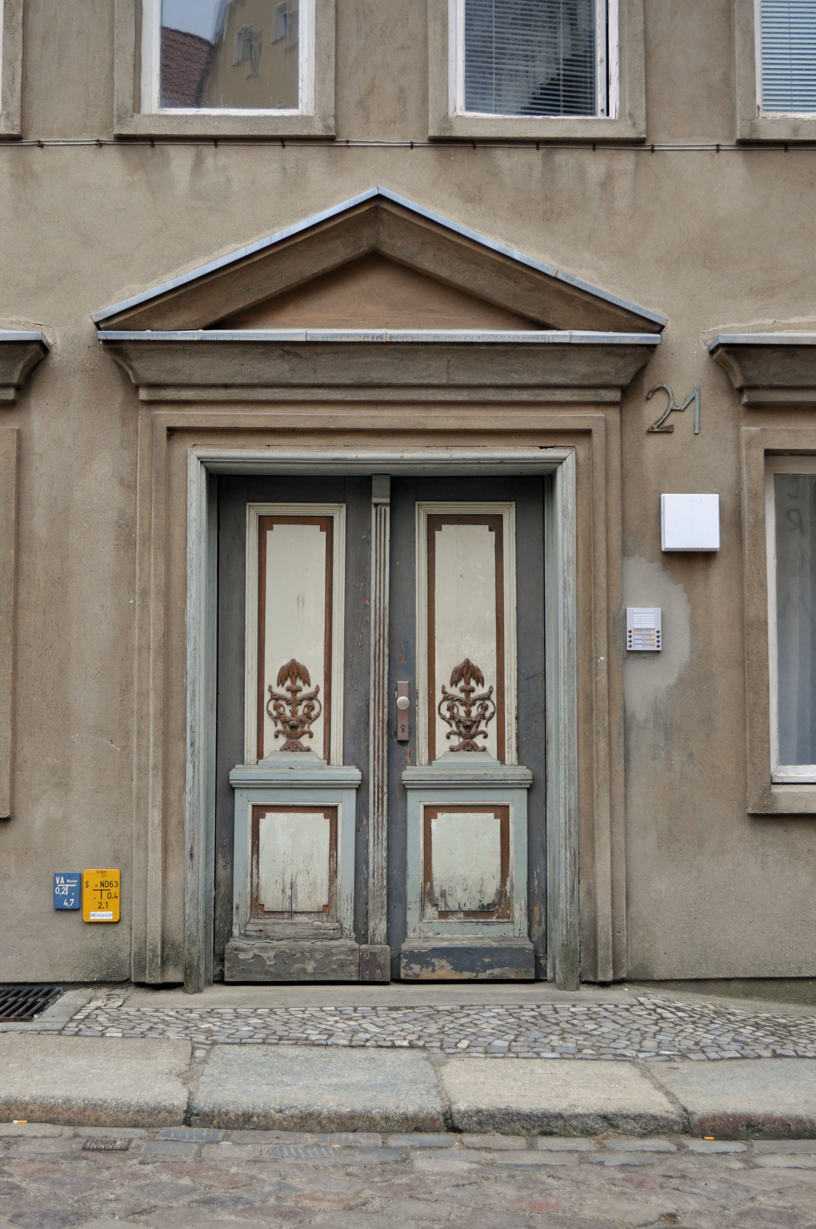 Gebäude bzw. Gebäudedetail in Stralsund. Straße und Hausnummer siehe Dateiname.